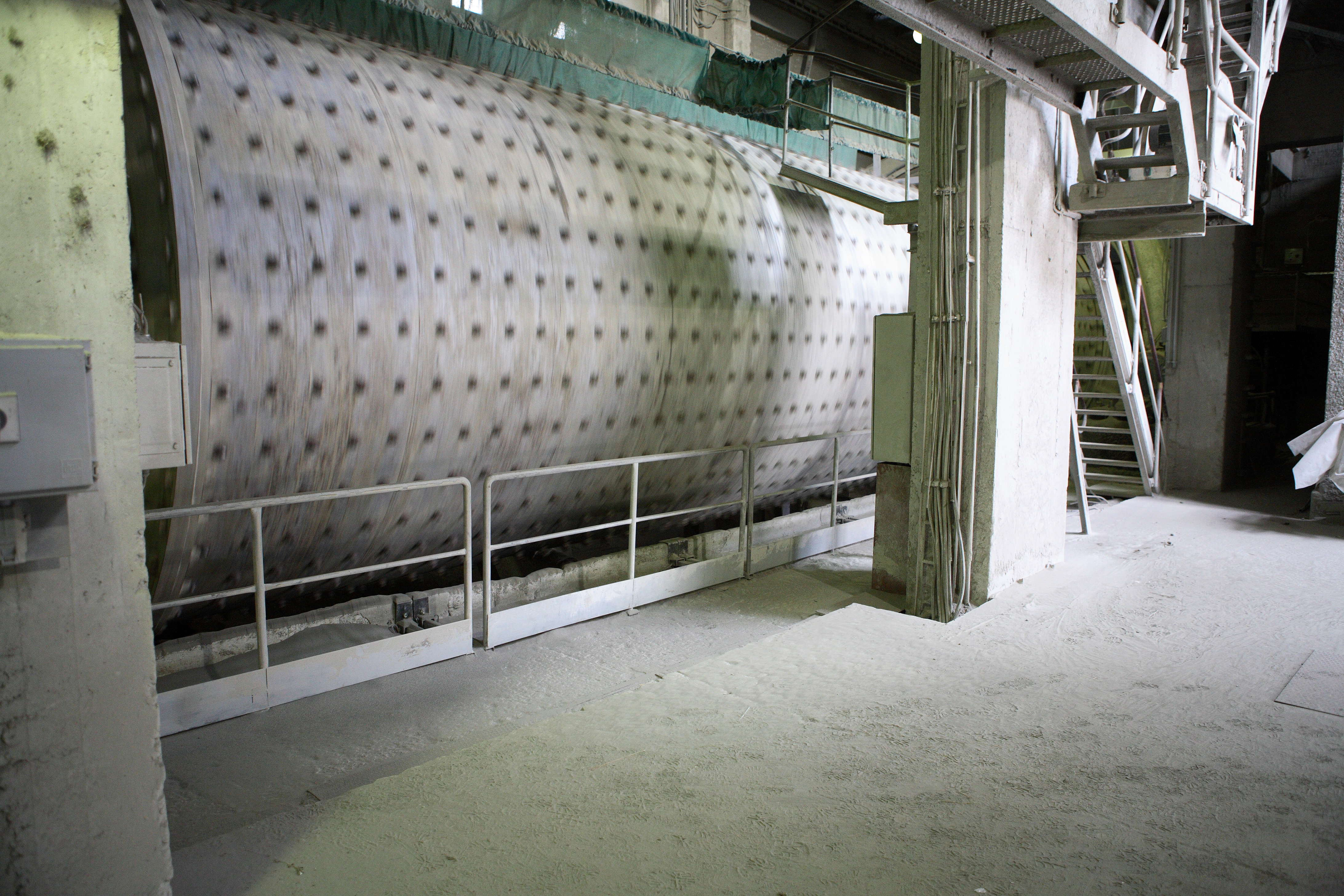 Mletje klinkerja